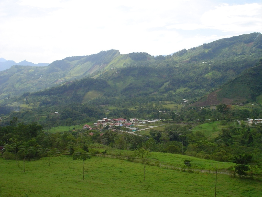 Fotografía de la inspección de Santa Rosa en el municipio de Maripi Boyaca en Colombia